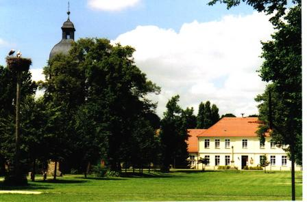 Blick auf die Schule, das ehemalige Herrenhaus von Wust